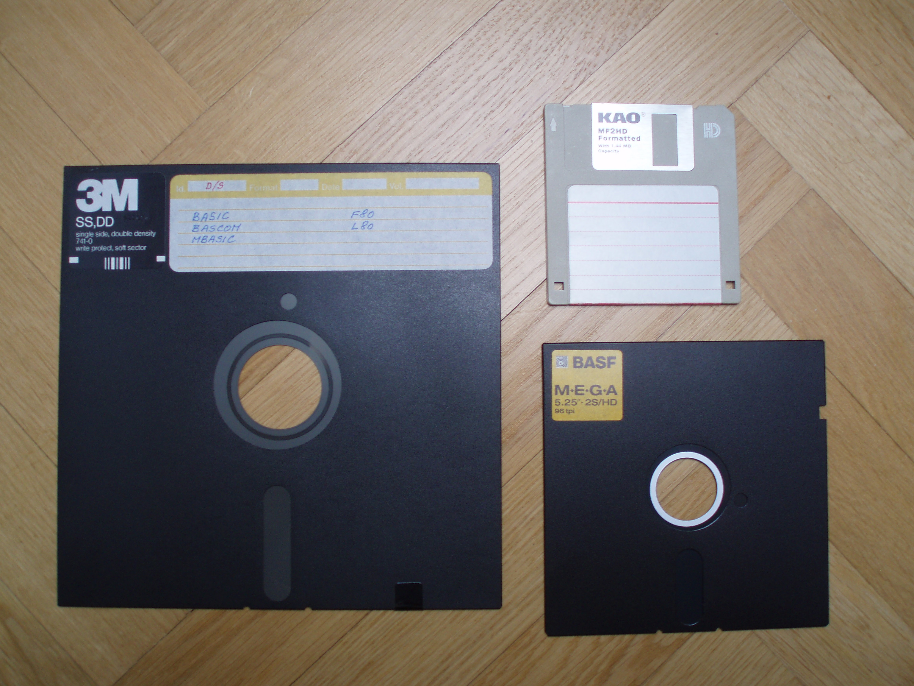 3 különböző fajtájú hajlékonylemez